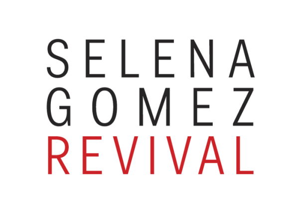 Logo albumu Revival